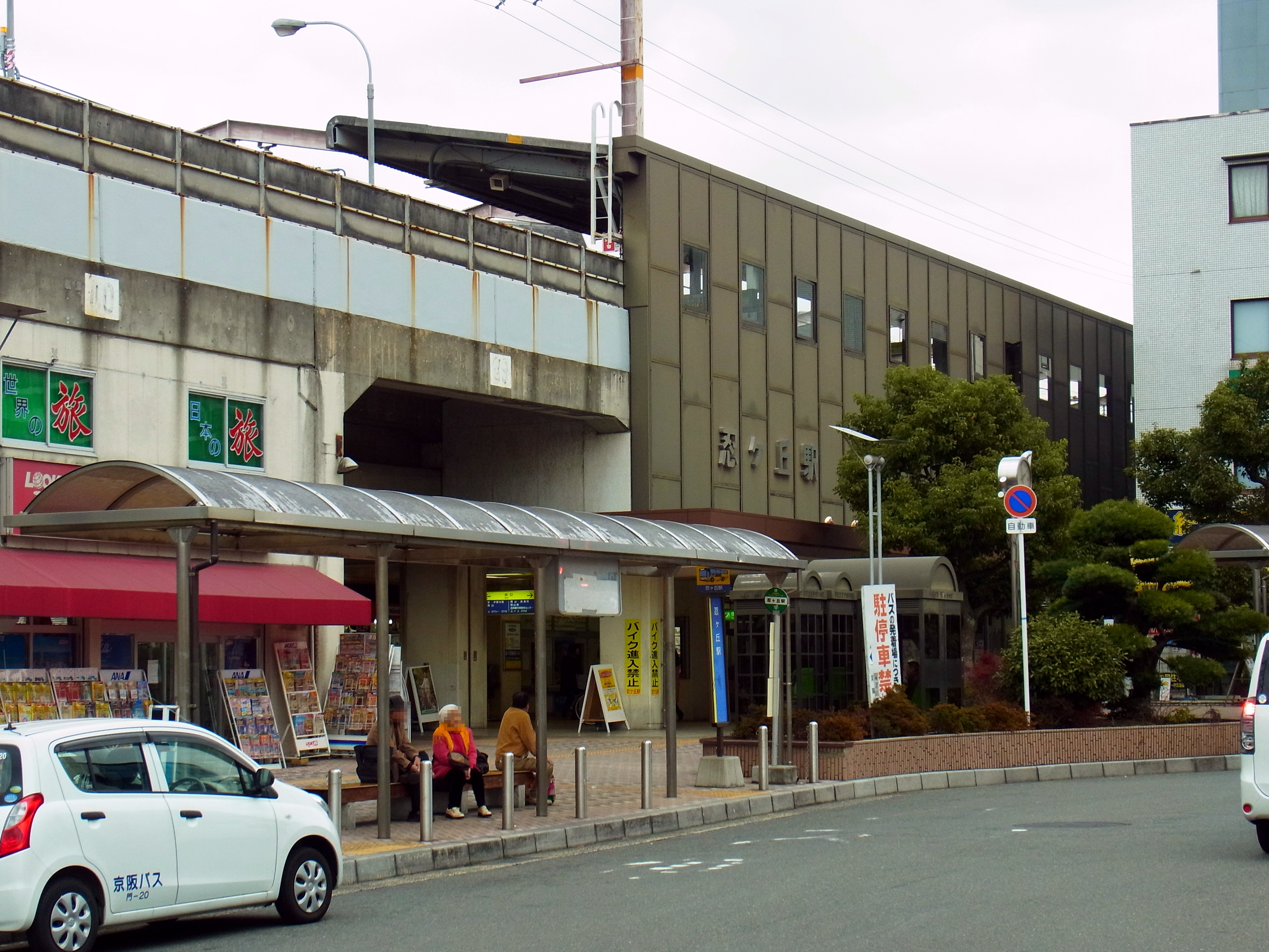 JR片町線 忍ケ丘駅 Shinobugaoka station 2012.12.17